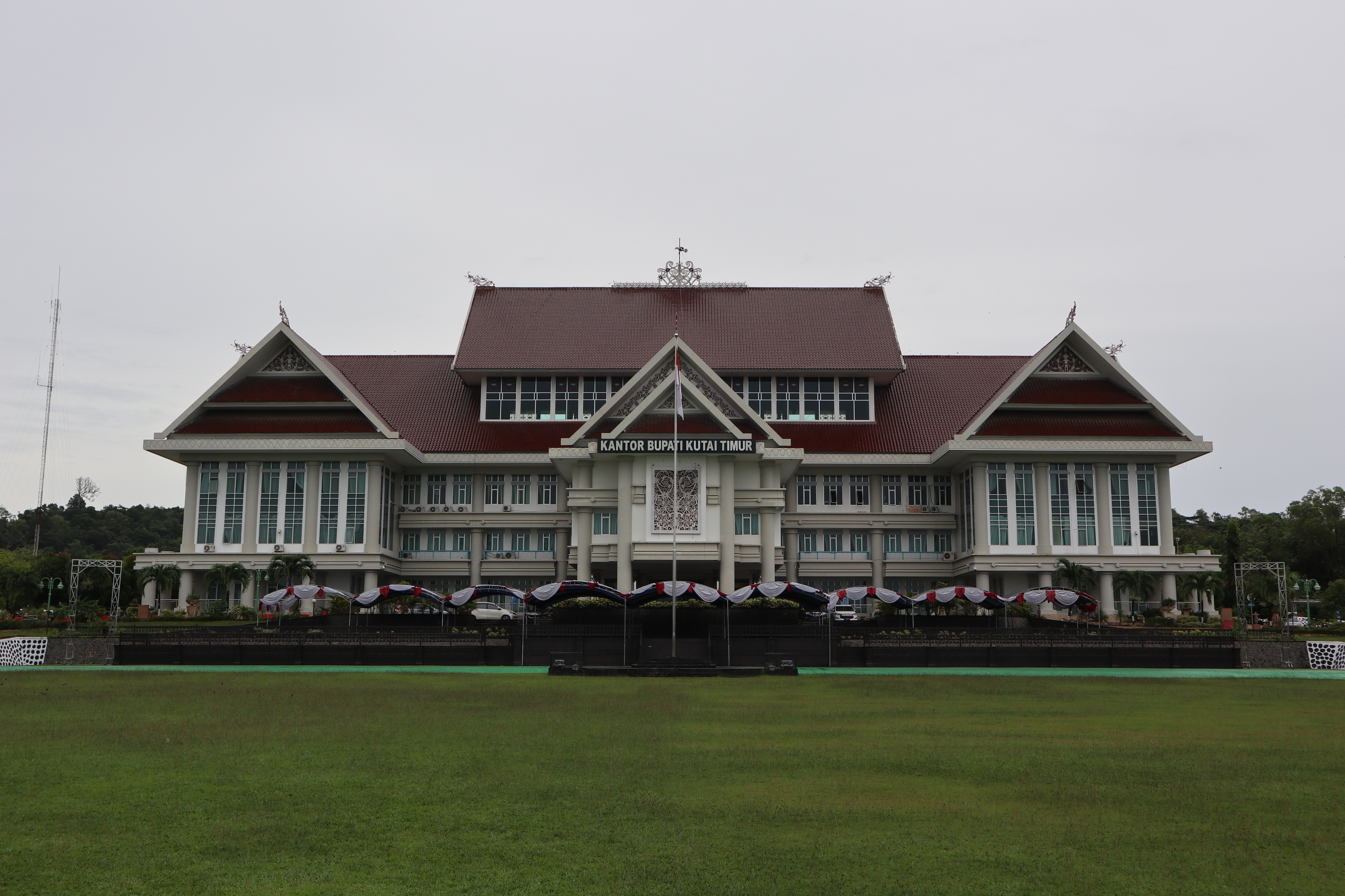 Kantor Bupati Kutai Timur di kota Sangatta.